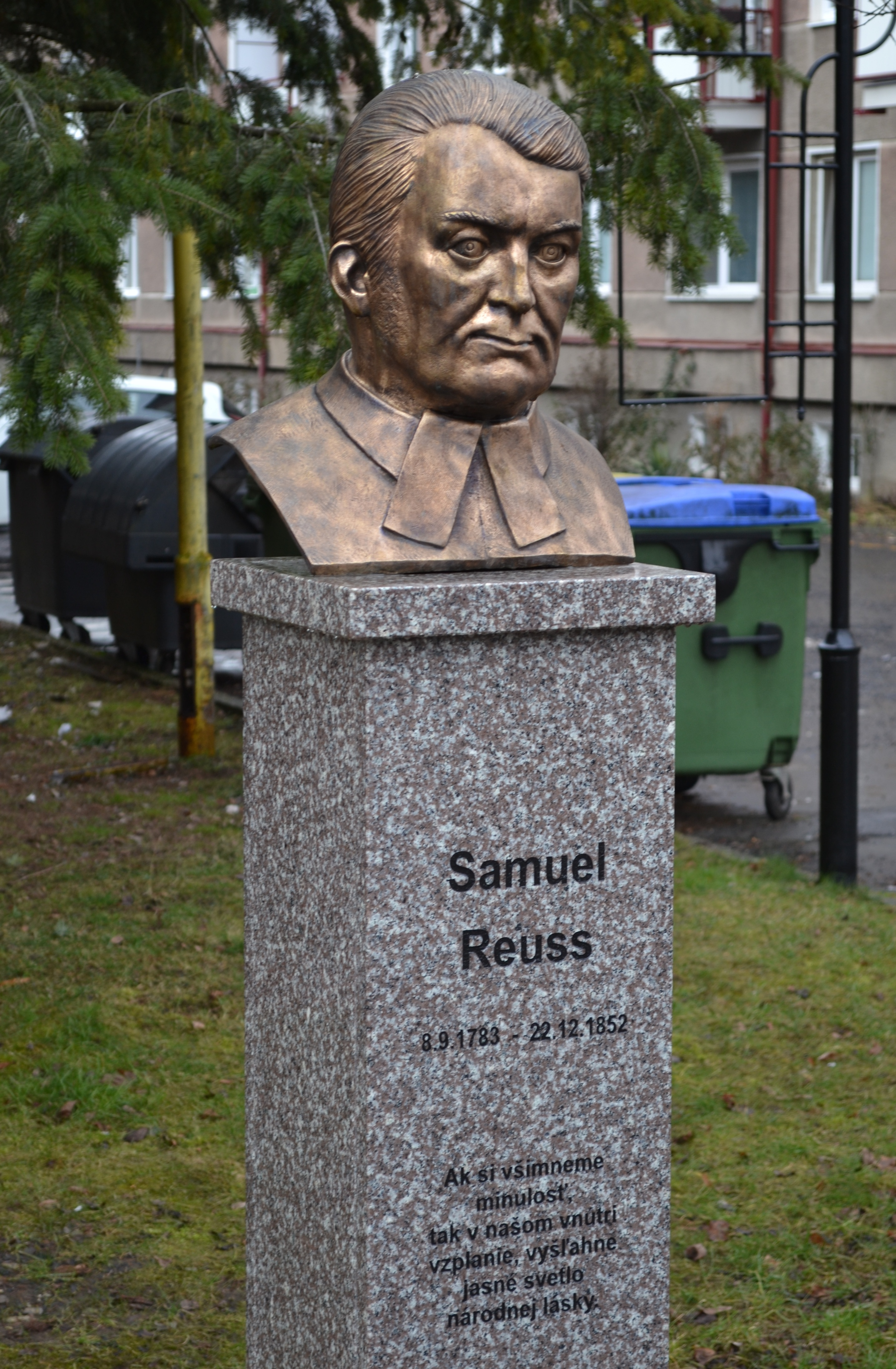 Aleja dejateľov, busta Samuela Reussa